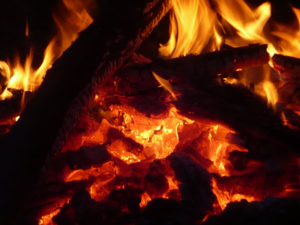 Braise d'un feu